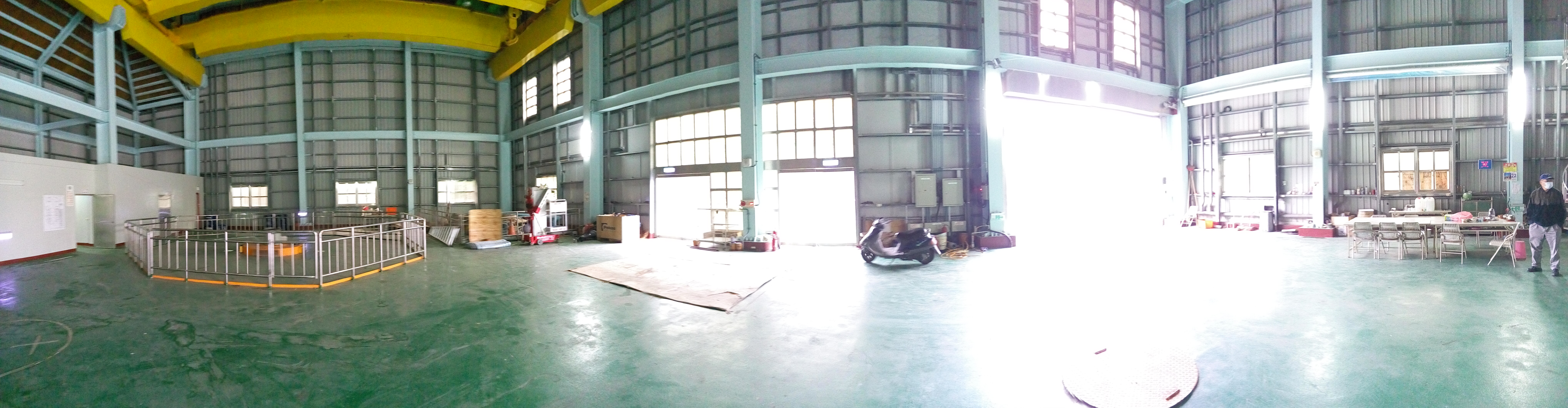 西口水力發電廠廠房內部全景圖